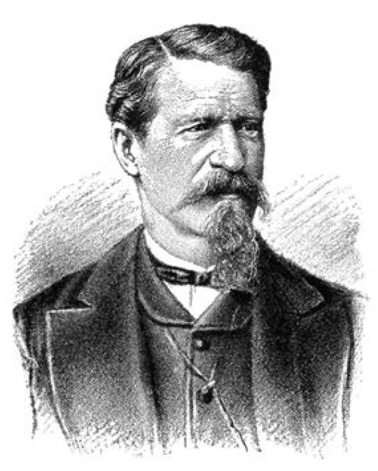 Portrait von Abraham Stocker (1825–1887), Schweizer Politiker